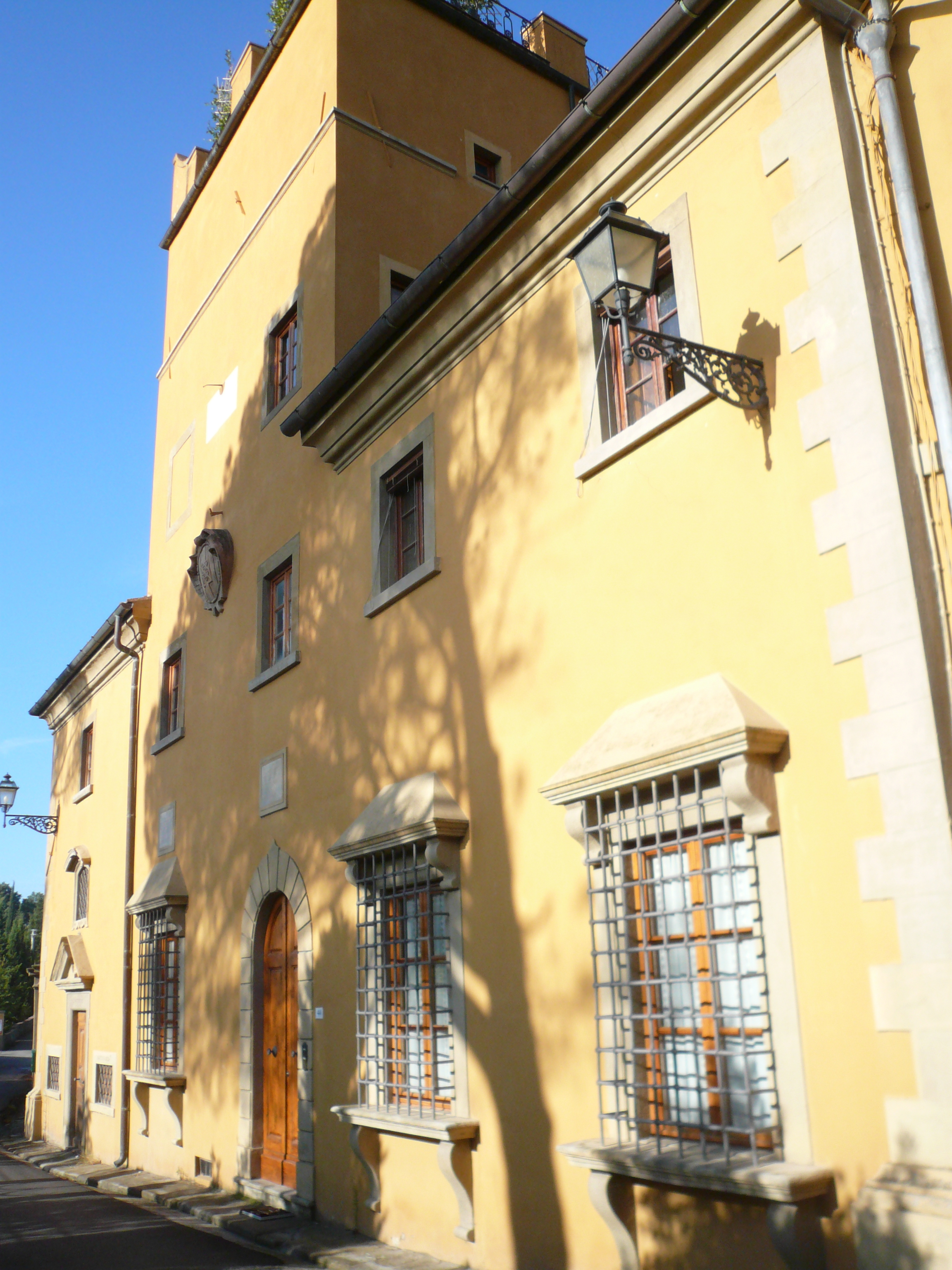 Partcolare della facciata della villa prospiciente via di Canonica con la torre merlata e la cappella di S. Cristoforo.